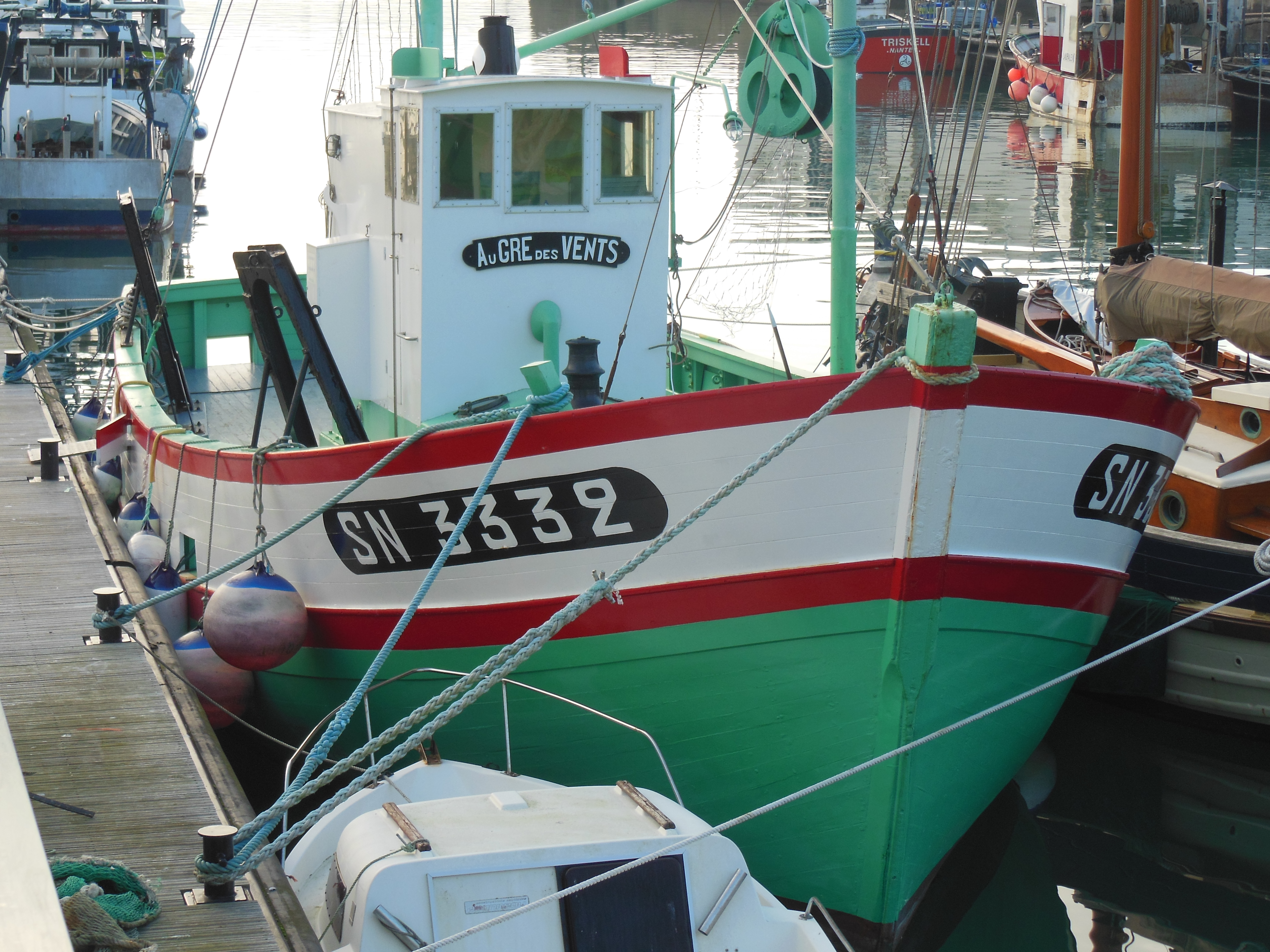 Au Gré des Vents, sardinier attaché au port de La Turballe